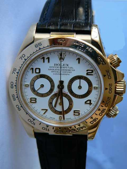 Selbst fotografiert